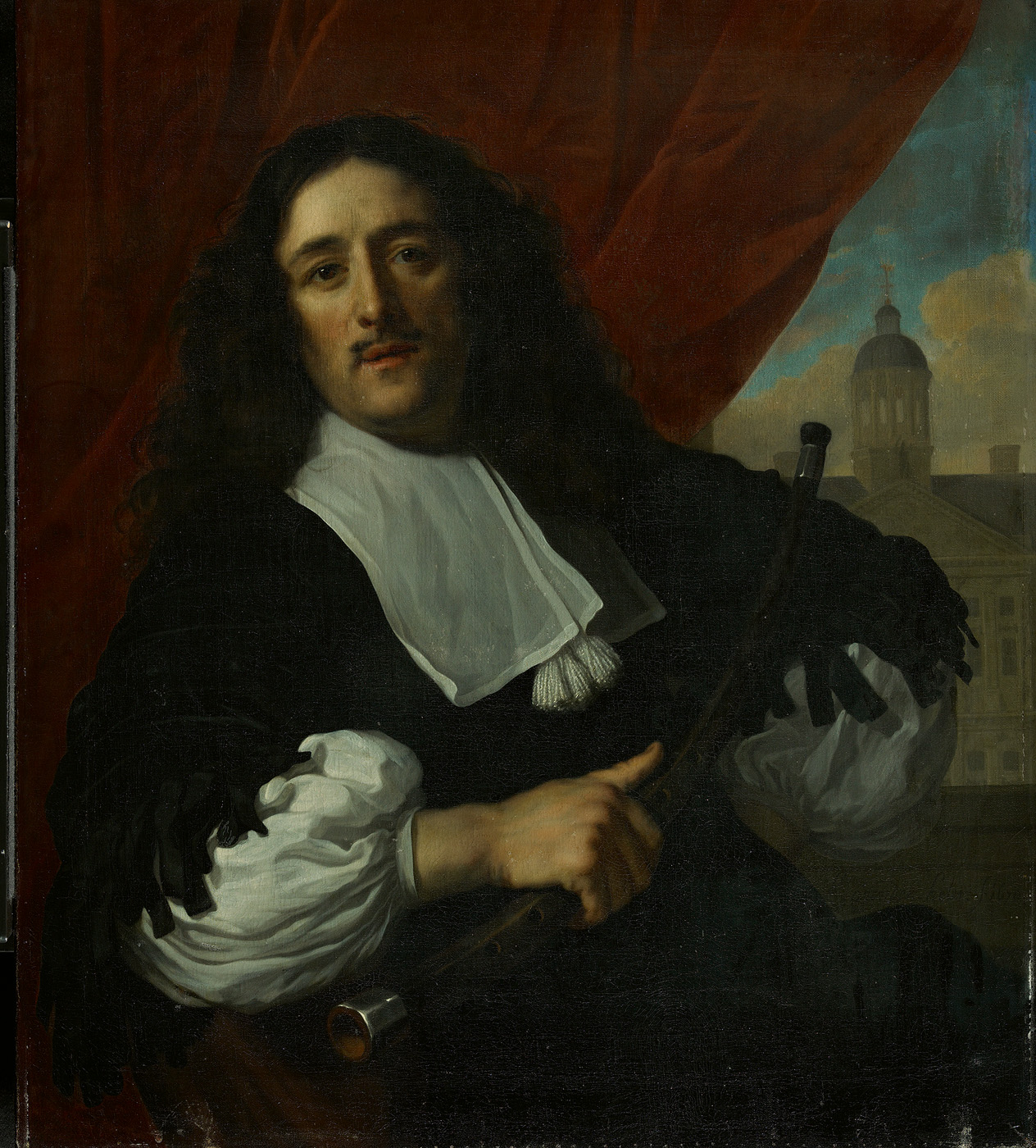 schilderij; portret; mansportret; portret Amsterdam; Stadhuis; Nuyts, Michiel Servaesz; Verbeek, Anthony; Campen, Jacob van